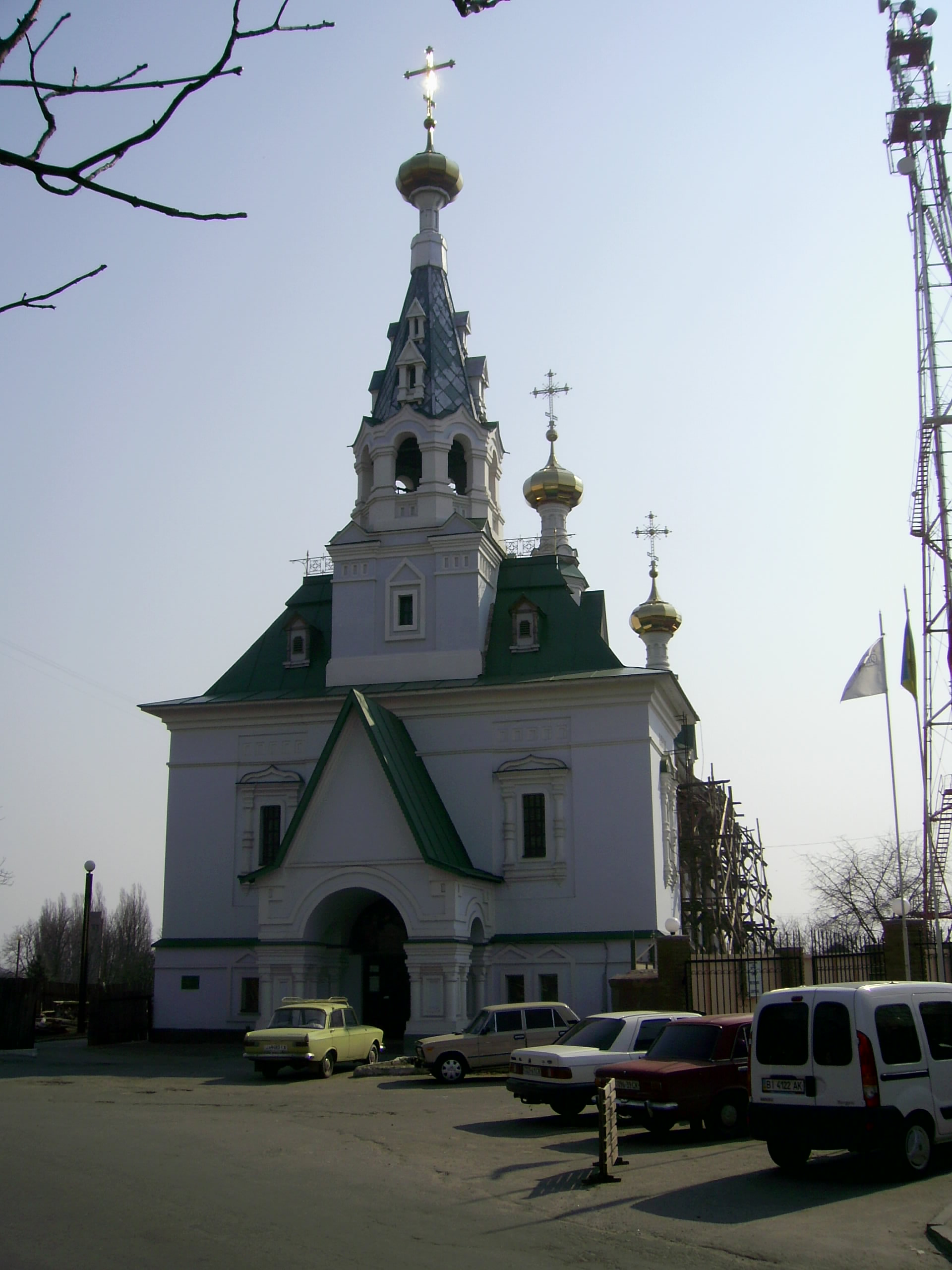 Полтавська область. Кобеляки